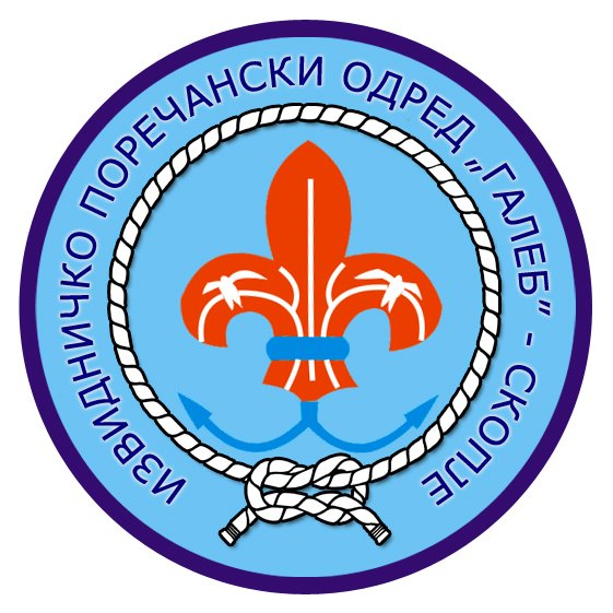 Лого на извидничкиот одред „Галеб“ - Скопје